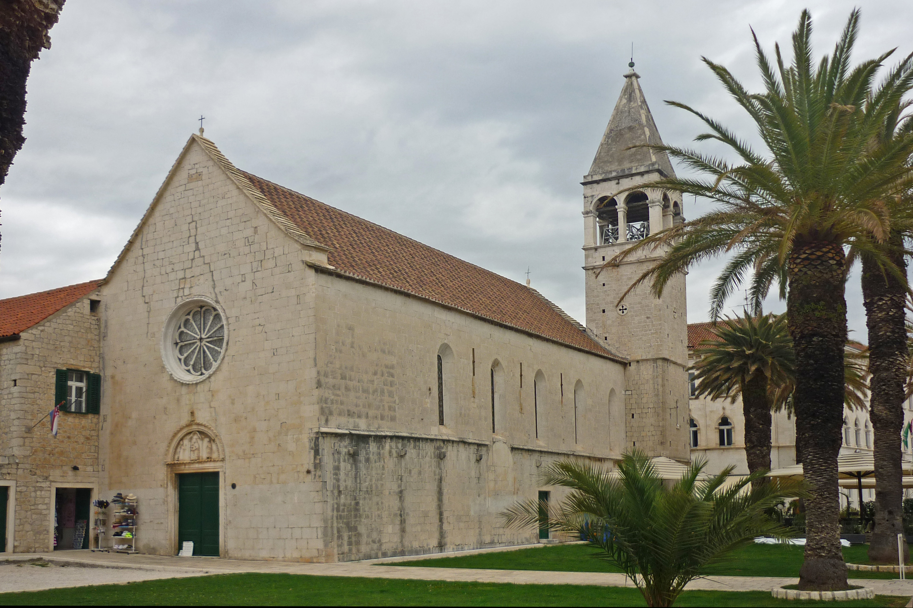 Dominikanerkirche in Trogir